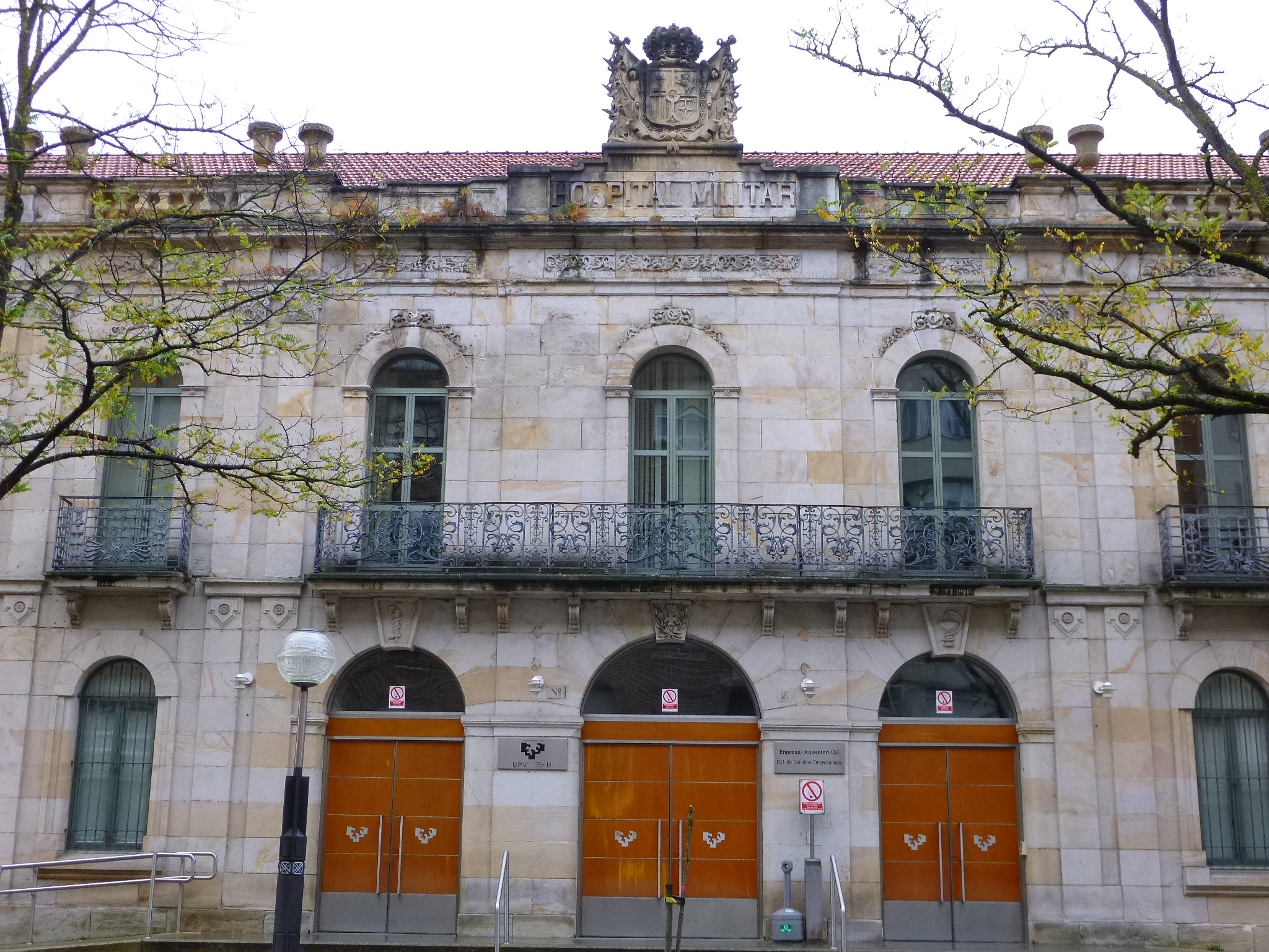 Campus Universitario de Álava, Escuela Universitaria de Estudios Empresariales (antiguo Hospital Militar), en Vitoria